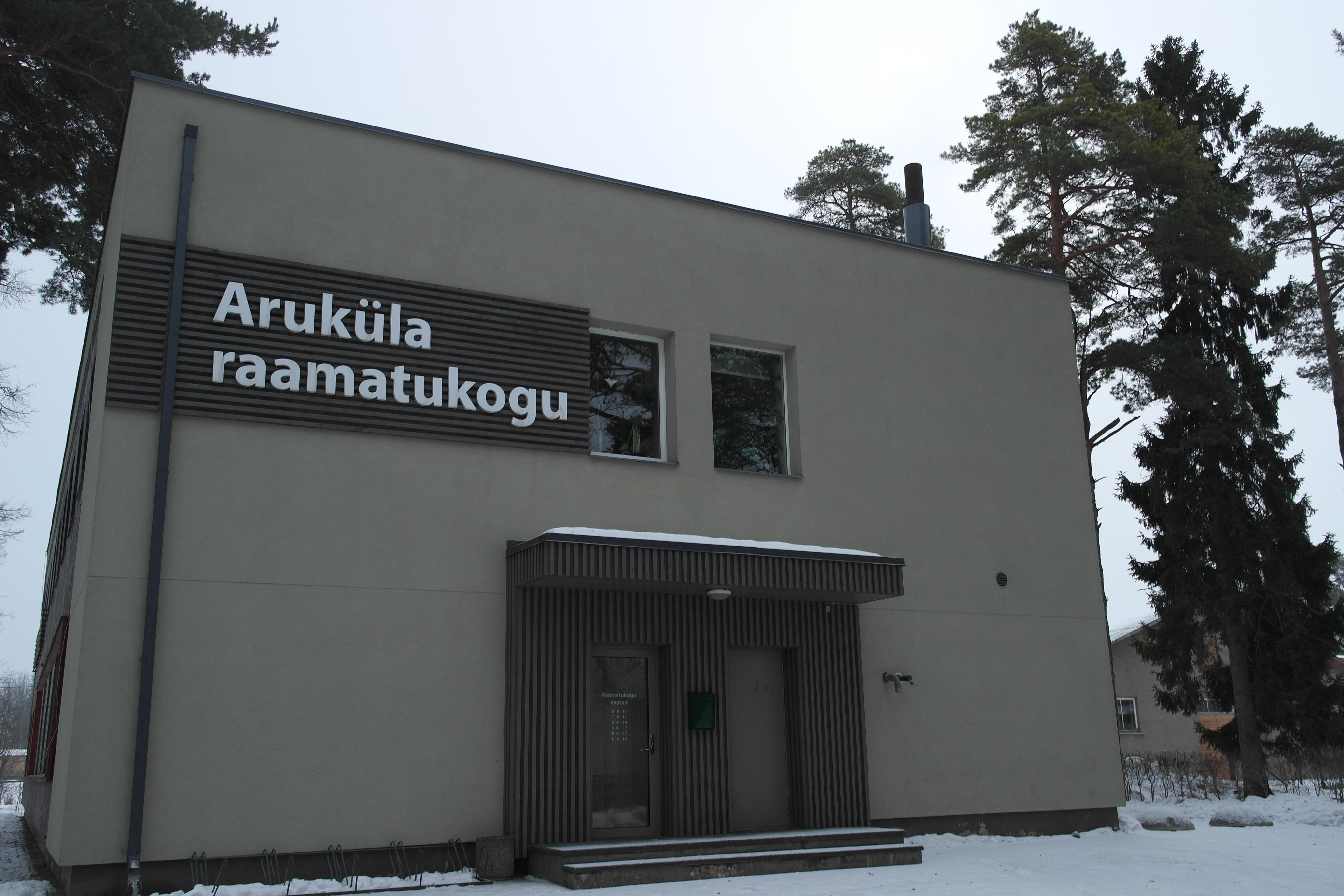 Aruküla Raamatukogu